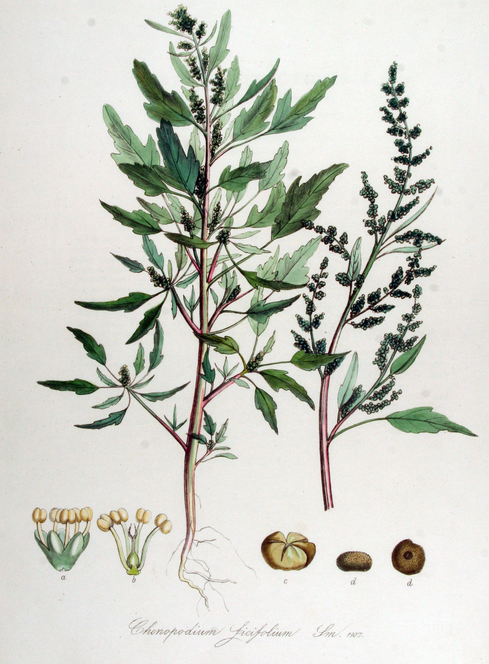 Chenopodium ficifolium Smith